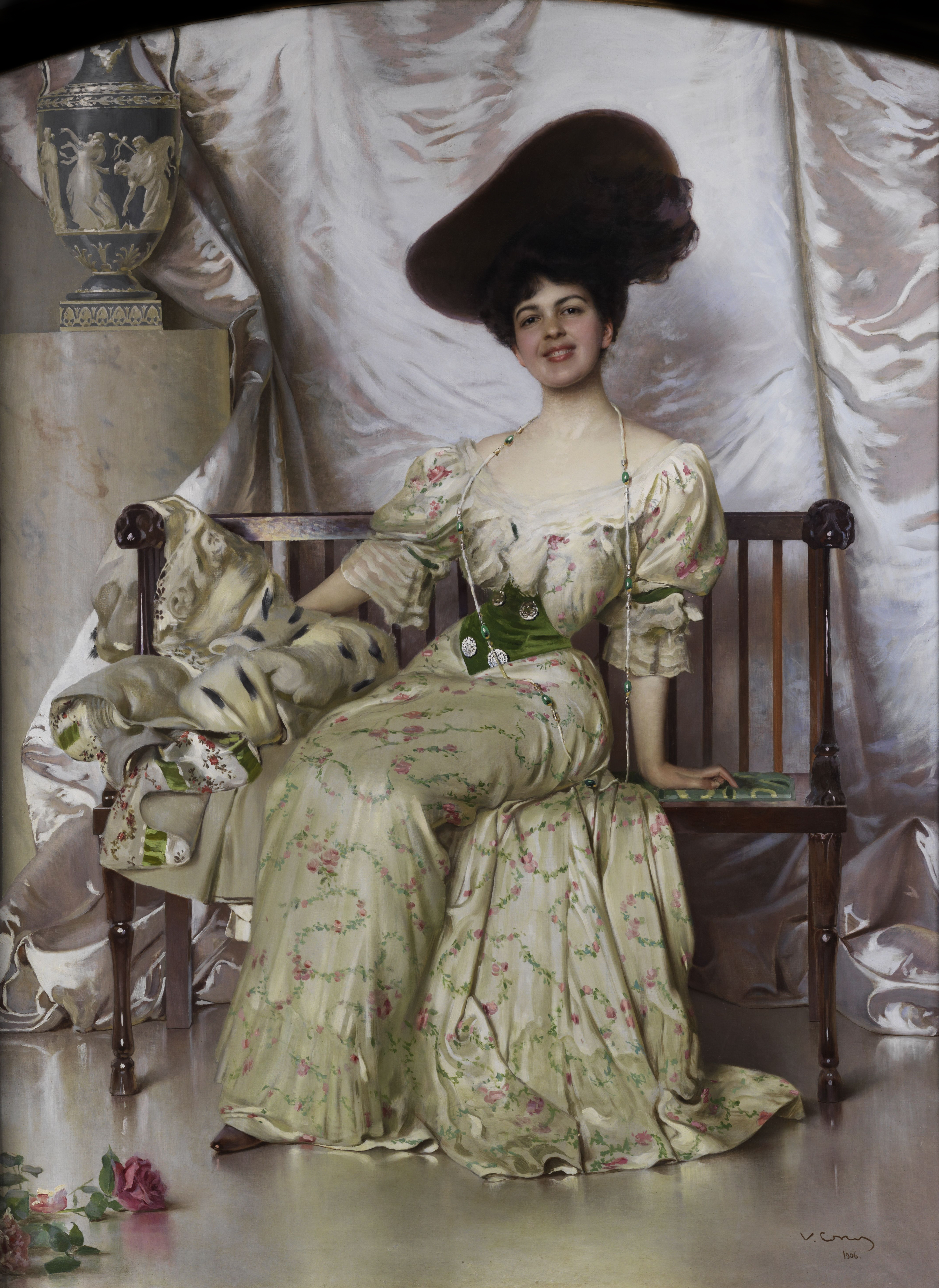 Portrait der Contessa Nerina Pisani Volpi di Misurata. Öl auf Leinwand. 200 x 140 cm. Rechts unten signiert und datiert „1906“. Contessa Nerina Pisani Volpi di Misurata († 1942), verewigt von Gabriele d’Annunzio im Roman „Il Fuoco“, war die erste Ehefrau des Herzogs Giuseppe Volpi di Misurata. Portrait de la comtesse Nerina Pisani Volpi di Misurata, qui fut immortalisée par Gabriele d'Annunzio dans son roman "Le feu", paru en 1900. La comtesse fut la première épouse du duc Giuseppe Volpi di Misurata.